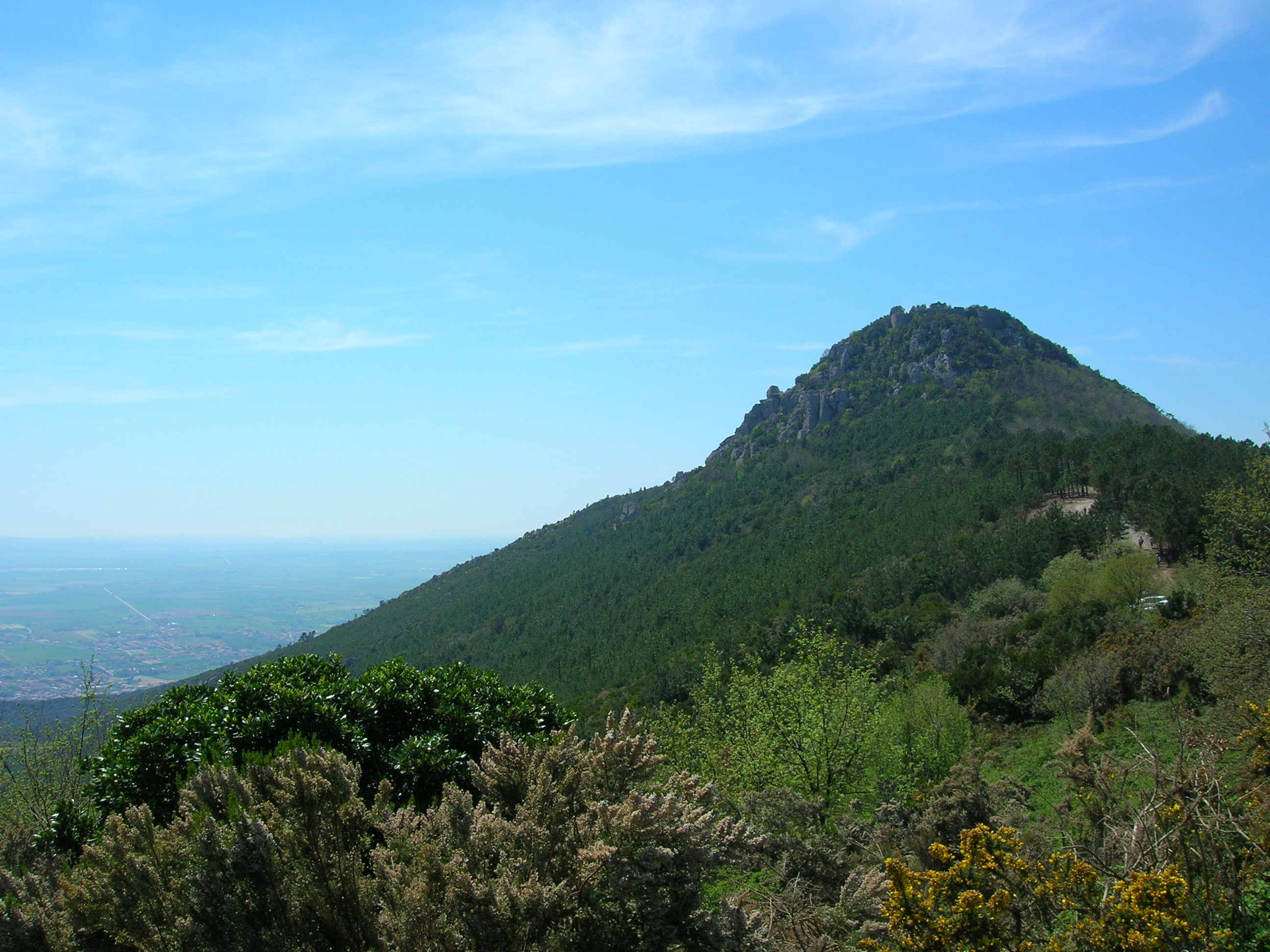 Rocca della Verruca vista dai ruderi di San Michele